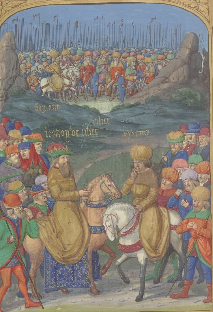 Cem (Zyzymy, rechts) und Kasım Bey (Le Roy de Cilice, links ) sind vor der Übermacht Bayezids II. (Bagiazit, hinten) in das Taurusgebirge geflüchtet.